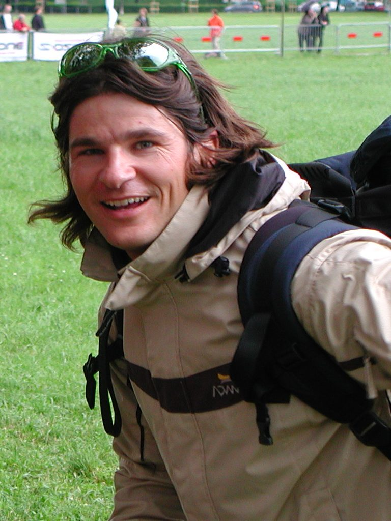 Bild Kari Eisenhut